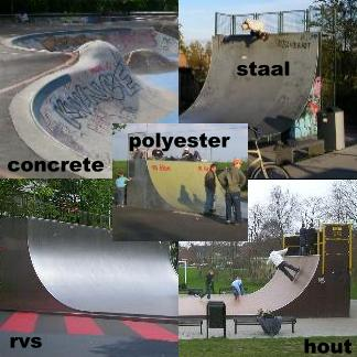 matriaal uitleg foto voor Skatebaan Eigen bewerking